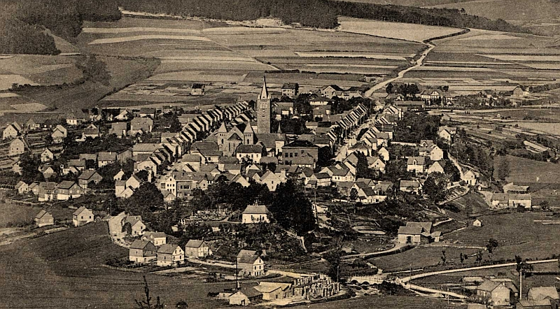 Schmallenberg (Germany), Anno 1910